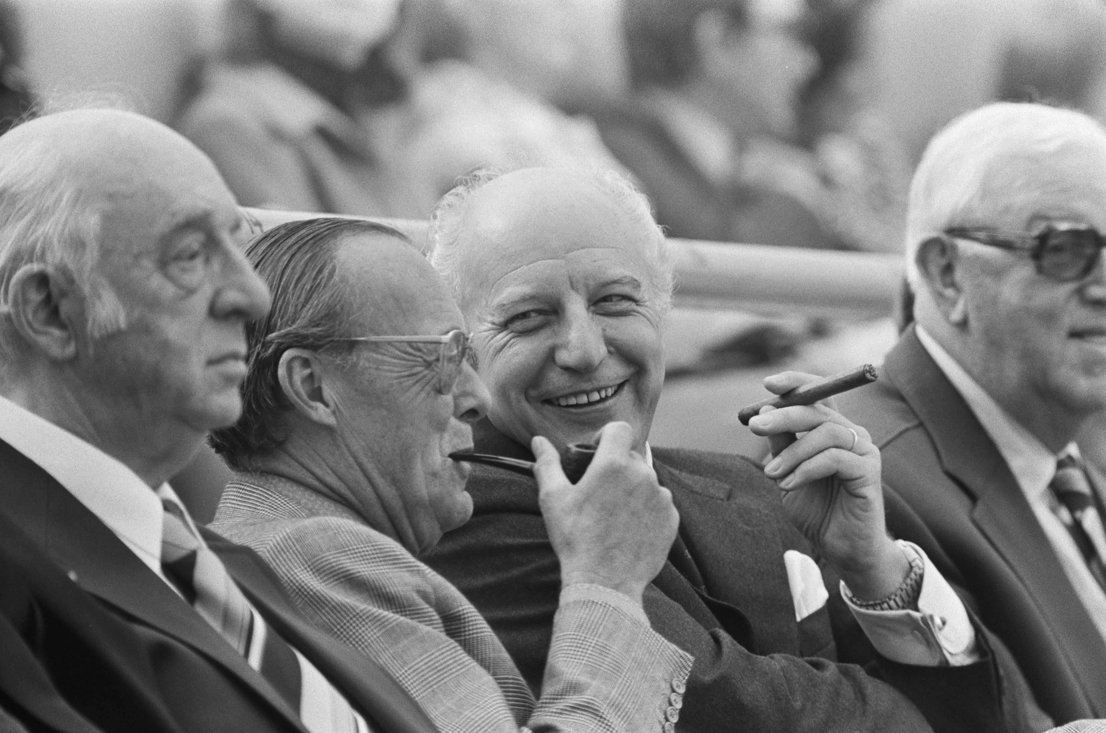 Collectie / Archief : Fotocollectie Anefo Reportage / Serie : [ onbekend ] Beschrijving : Finale wereldkampioenschap voetbal 1974 in Munchen, West Duitsland tegen Nederland 2-1; Prins Bernhard en president Scheel Datum : 7 juli 1974 Locatie : München, Nederland, West-Duitsland Trefwoorden : finales, sport, voetbal, wereldkampioenschappen Persoonsnaam : Bernhard, prins Fotograaf : Verhoeff, Bert / Anefo Auteursrechthebbende : Nationaal Archief Materiaalsoort : Negatief (zwart/wit) Nummer archiefinventaris : bekijk toegang 2.24.01.05 Bestanddeelnummer : 927-3118